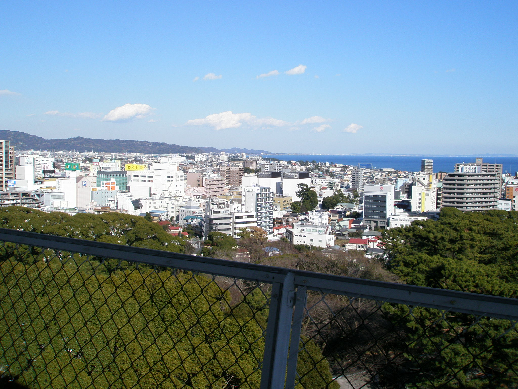 小田原城からの眺め(小田原市街方向)